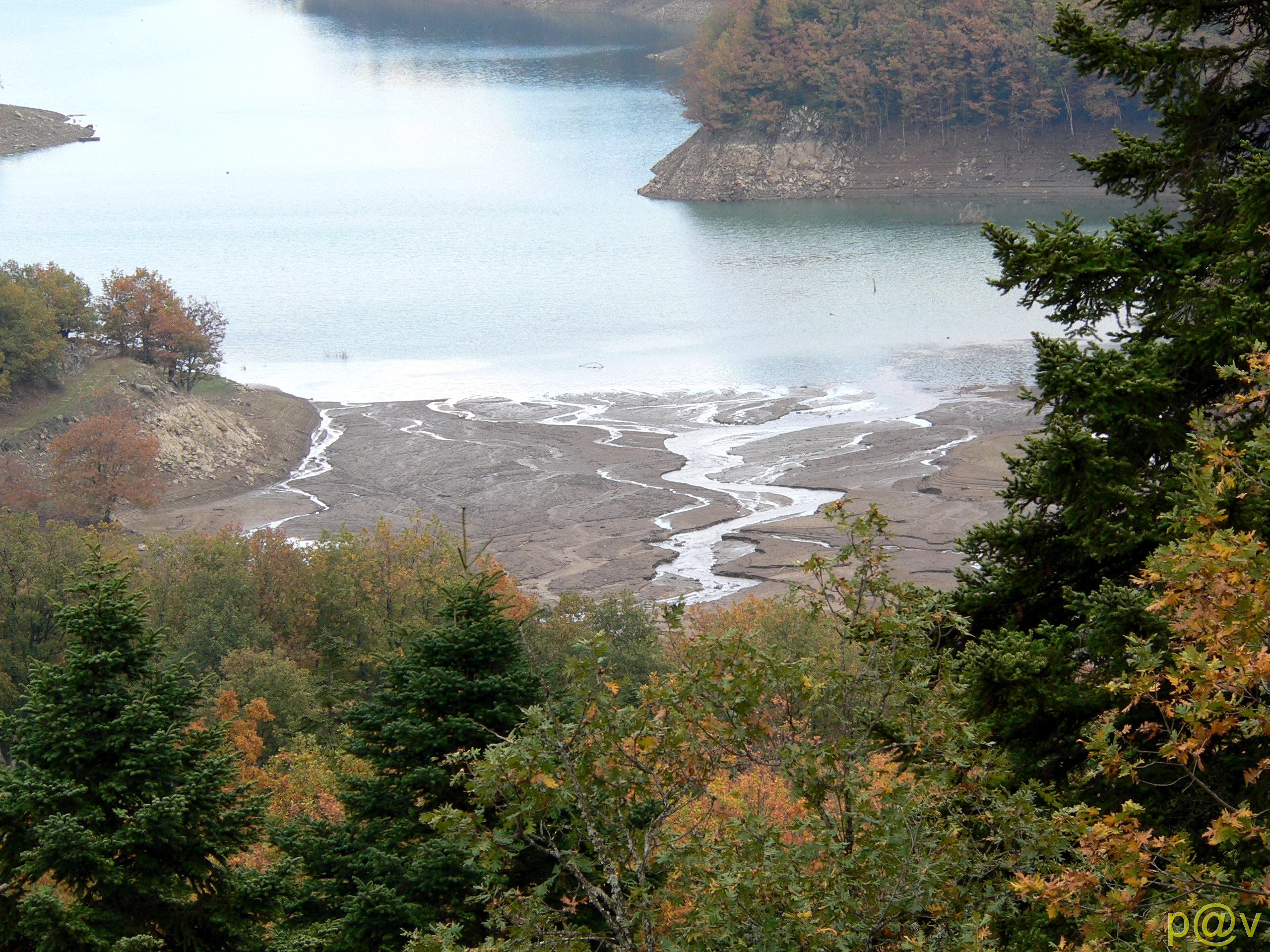 Οι εκβολες του Καρτσιωτη ανοιξη